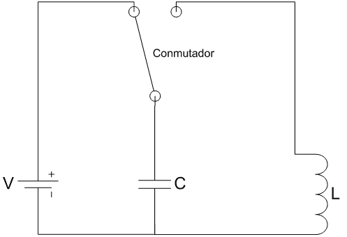 Circuito simple de oscilador LC compuesto de bobina, condensador, bateria y conmutador